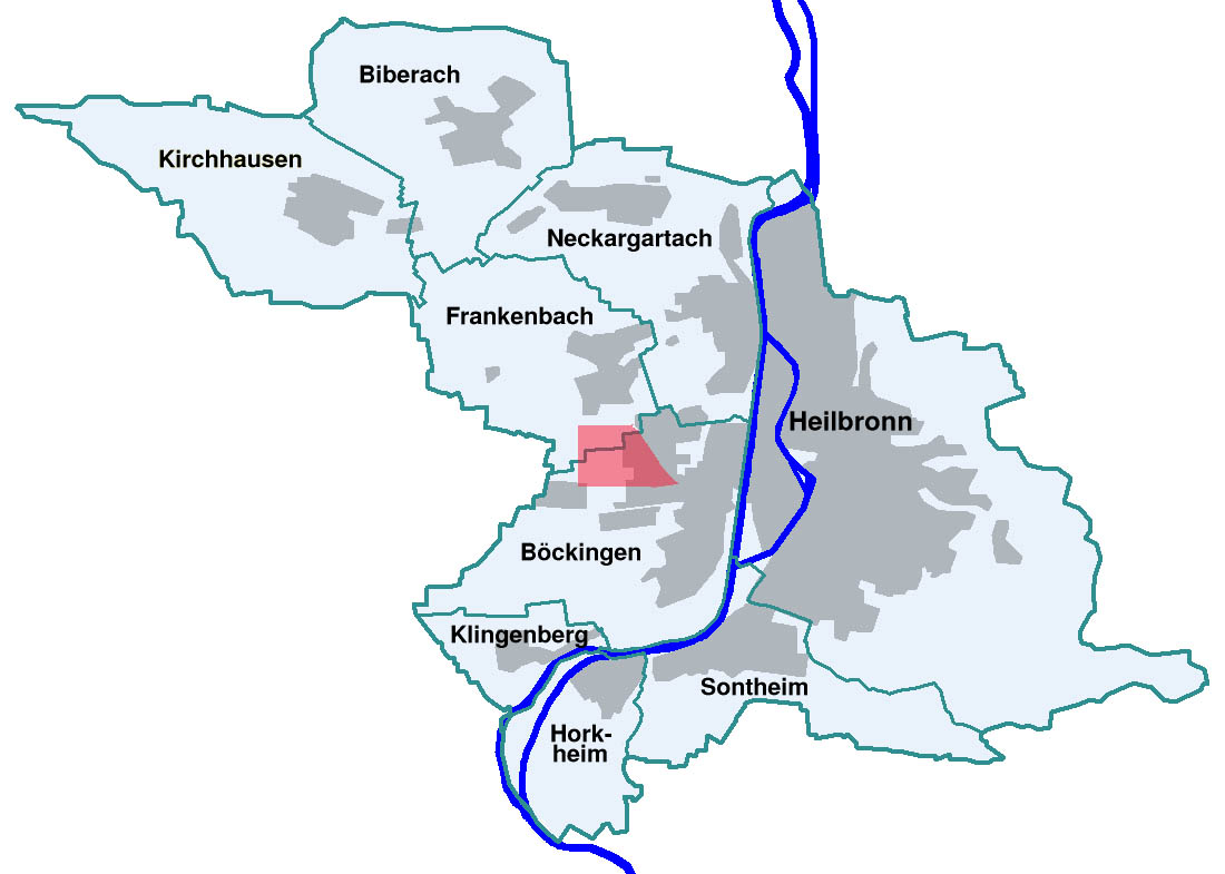 Lage des ehemaligen Kriegsgefangenenlagers PWE 10 innerhalb des heutigen Siedlungsgebiets von Heilbronn